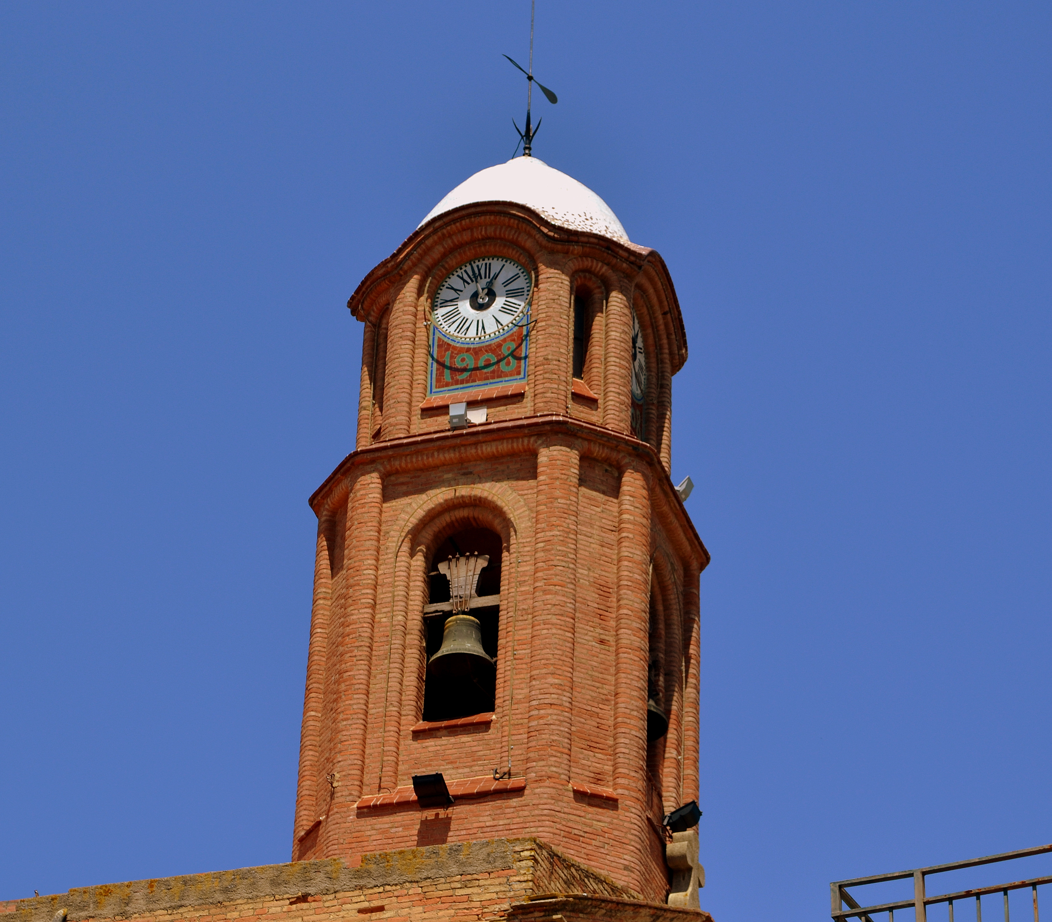 El terme d'Ullastrell va tenir fins al segle XIX un poblament dispers, repartir entre diversos masos. El conjunt urbà es va anar formant a començament del segle XIX, a partir de tres nuclis, can Gras, la Serra i el Sardà. En aquest darrer barri es va construir l'església parroquial l'any 1902, que substituïa una antiga capella romànica que no ha deixat cap vestigi. L'edifici és de planta rectangular, acabat tot ell en maó vist. La façana principal s'estructura en dos cossos horitzontals separats per una cornisa i coronats amb un frontó triangular. Al cos inferior hi ha el portal rectangular i un conjunt de motllures que tenen continuïtat al nivell superior en forma de pilastres. En aquest cos hi ha un finestral semicircular. El campanar és posterior, del 1908, obra de Lluís Muncunill. Afectada durant la Guerra Civil, va ser restaurada posteriorment per Alexandre Tintoré.